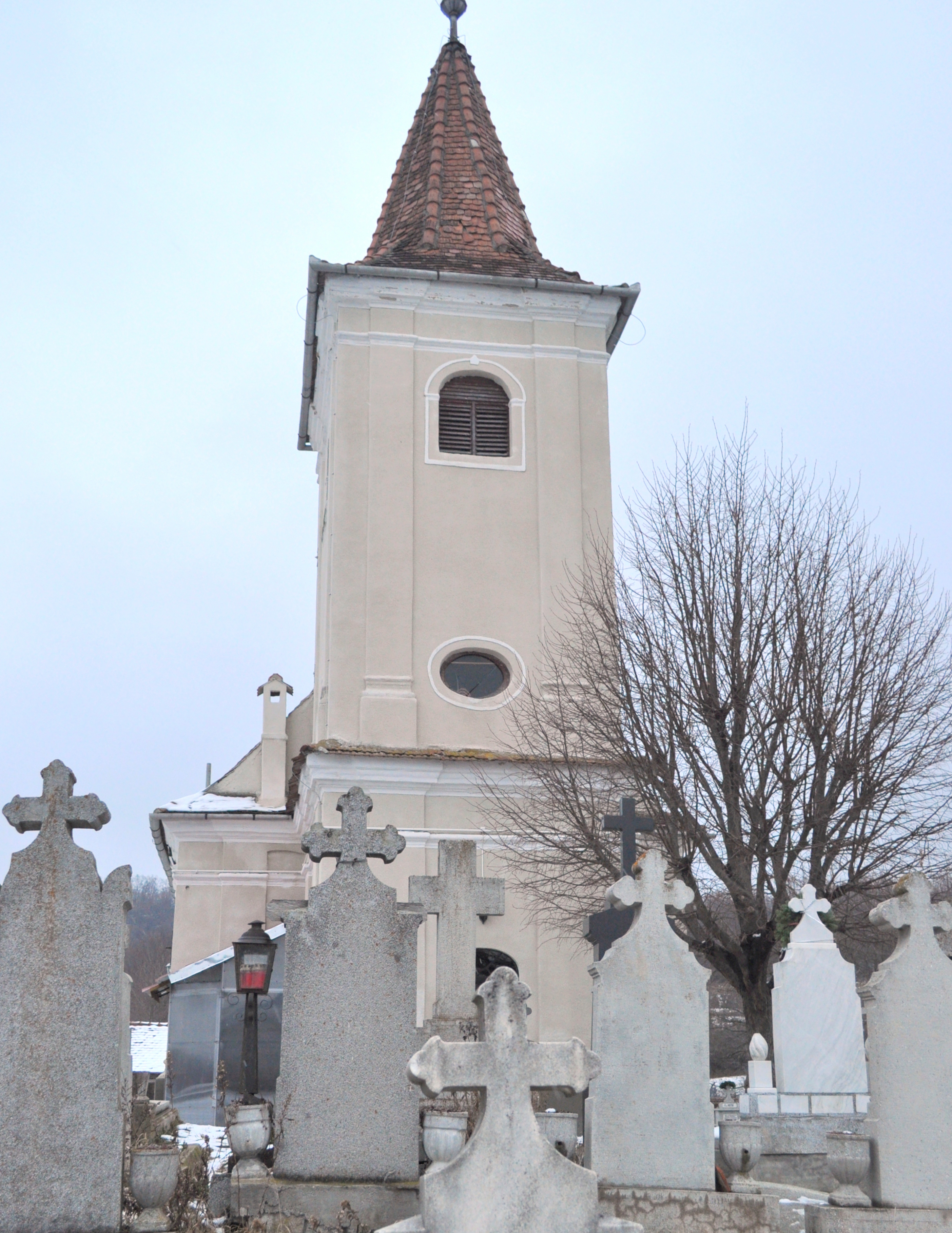 Biserica "Sf. Nicolae" din Mohu, județul Sibiu